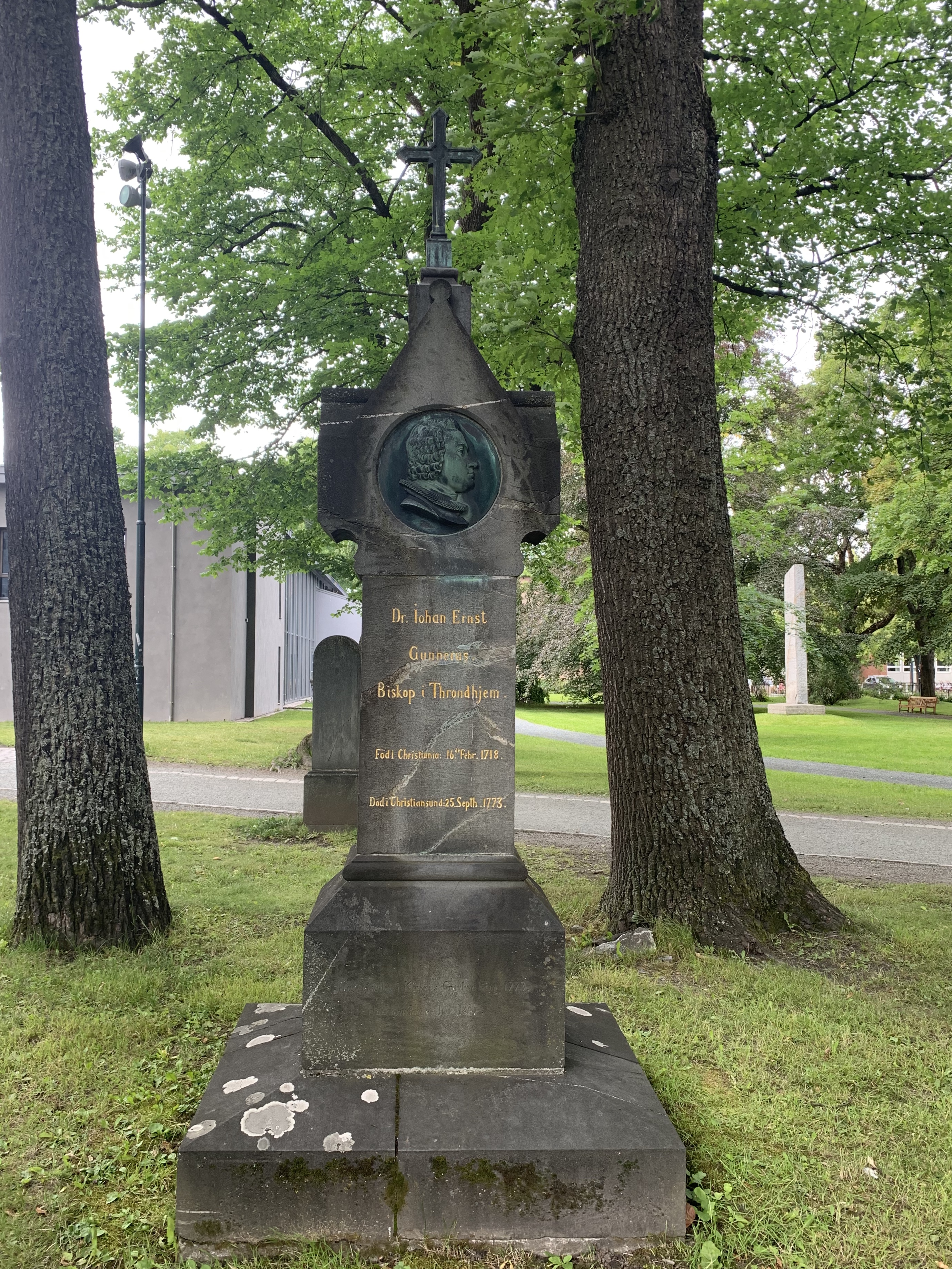 Gravminne over biskop Johan Ernst Gunnerus ved Nidarosdomen i Trondheim. På baksiden står følgende tekst: Videnskabsselskabet i Trondhjem reiste sin Grundlægger dette Gravminde MDCCCCLXXIII (kilde: Trondhjems Adressekontor Efterretninger 1873, nr. 300 A. Arkitekt Ebbel tegnet monumentet. Mer informasjon i boken Johan Ernst Gunnerus : Mindeblade. Trondhjem 1918